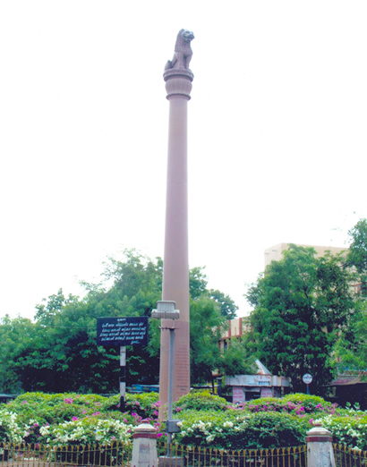 Kirti Stambh